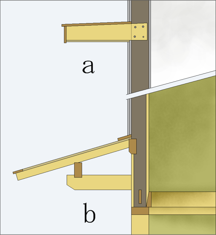 日本の木造建築における庇(腕木庇・ろく庇)の断面図